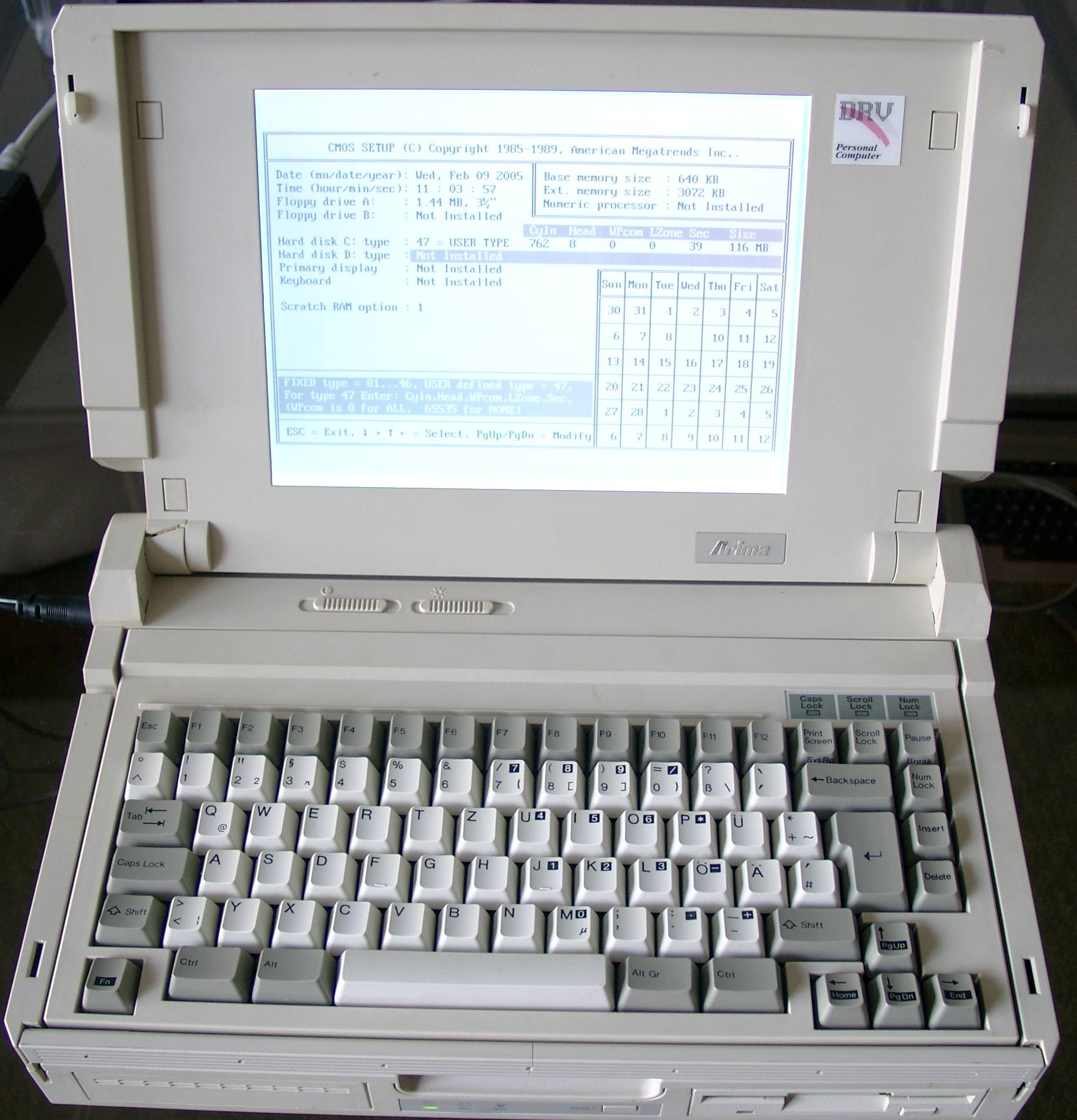 ARIMA Laptop mit herausnehmbarer Tastatur, Baujahr 1990